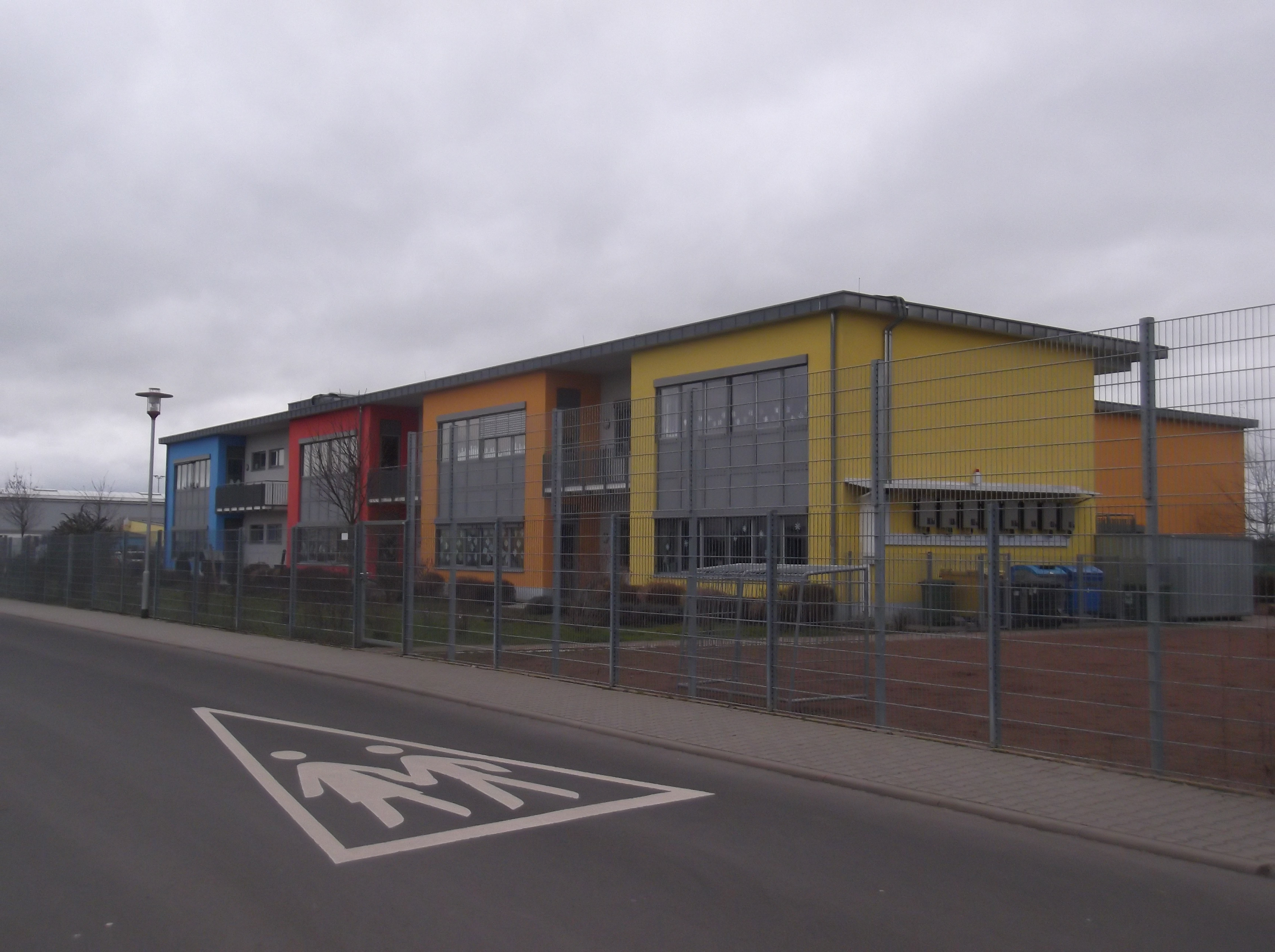 Die neue Ganztagsgrundschule in Hahn gebaut 2006